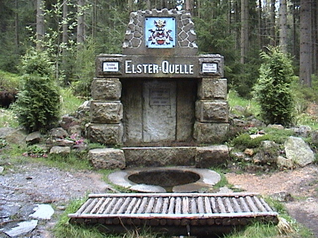 Quelle der Weißen Elster bei Aš (Tschechien)